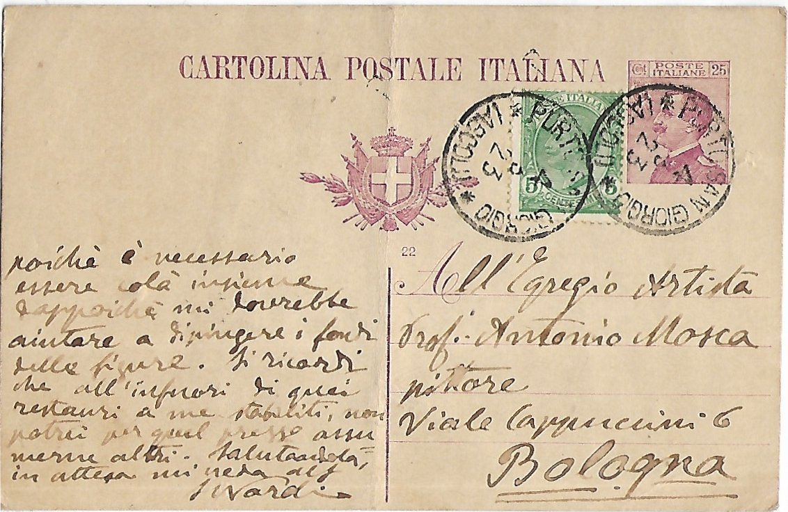 Cartolina postale spedita da Porto San Giorgio il 4 aprile 1923 da Sigismondo Nardi al pittore Antonio Mosca via dei Cappuccini, 6 Bologna per prendere accordi per i lavori di restauro e decorazione della parrocchia di Borgo Valsugana